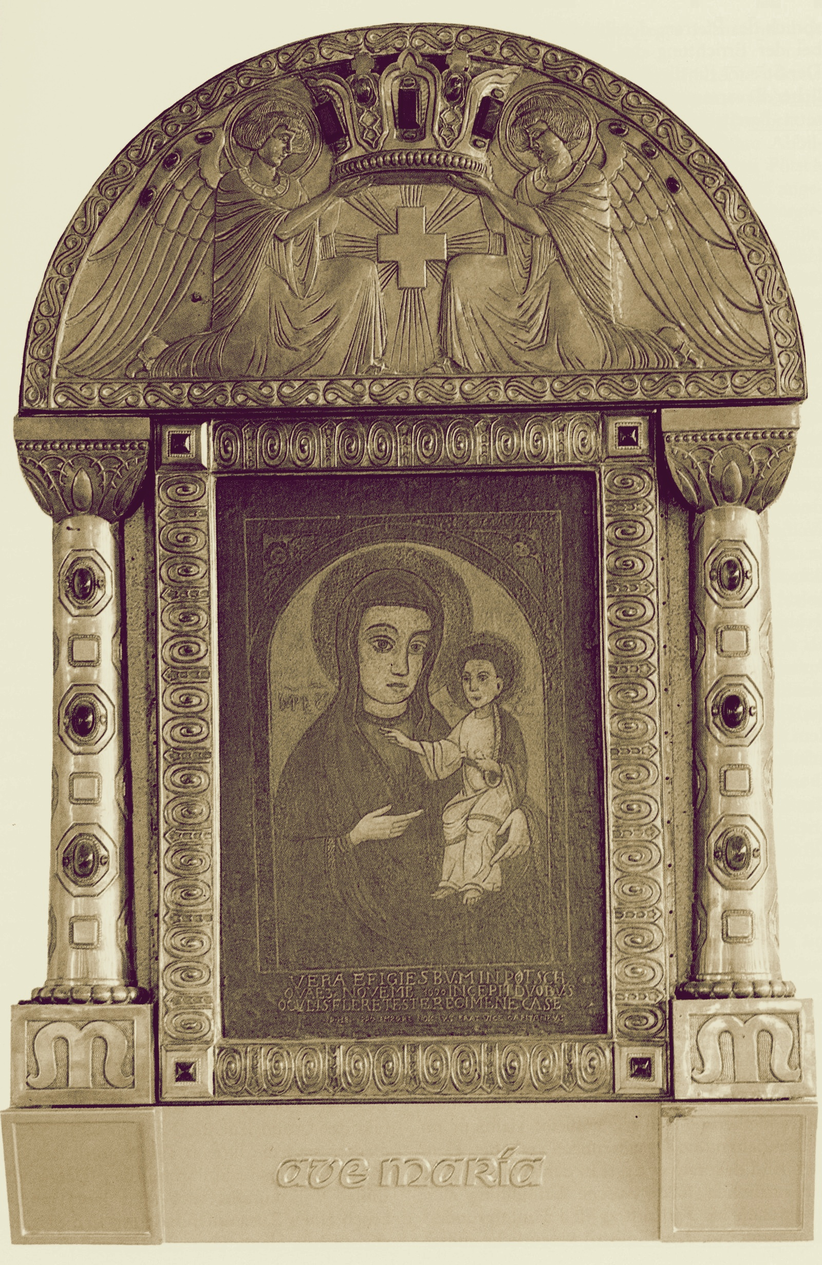 Kindsbacher Gnadenbild von 1700, mit Rahmen von Rudolf Perignon